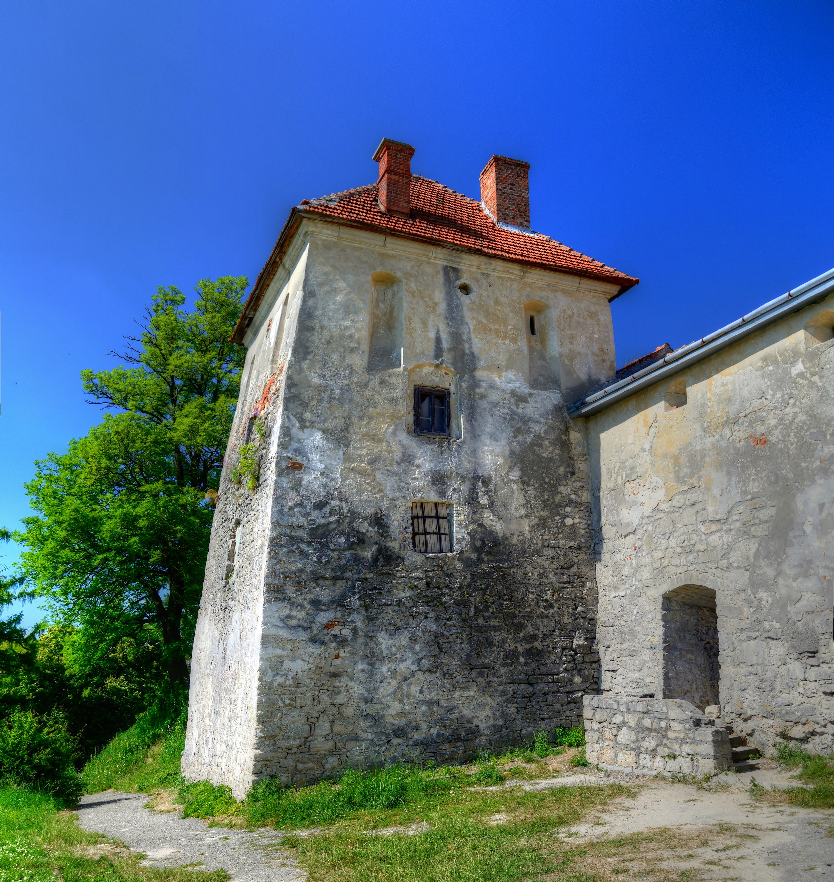 Одна з веж замку